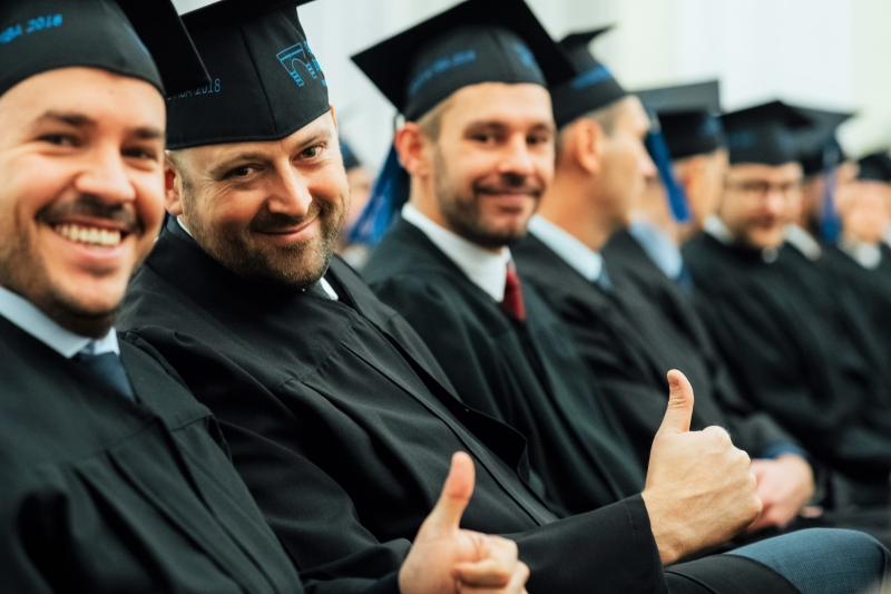 Graduacja Executive MBA